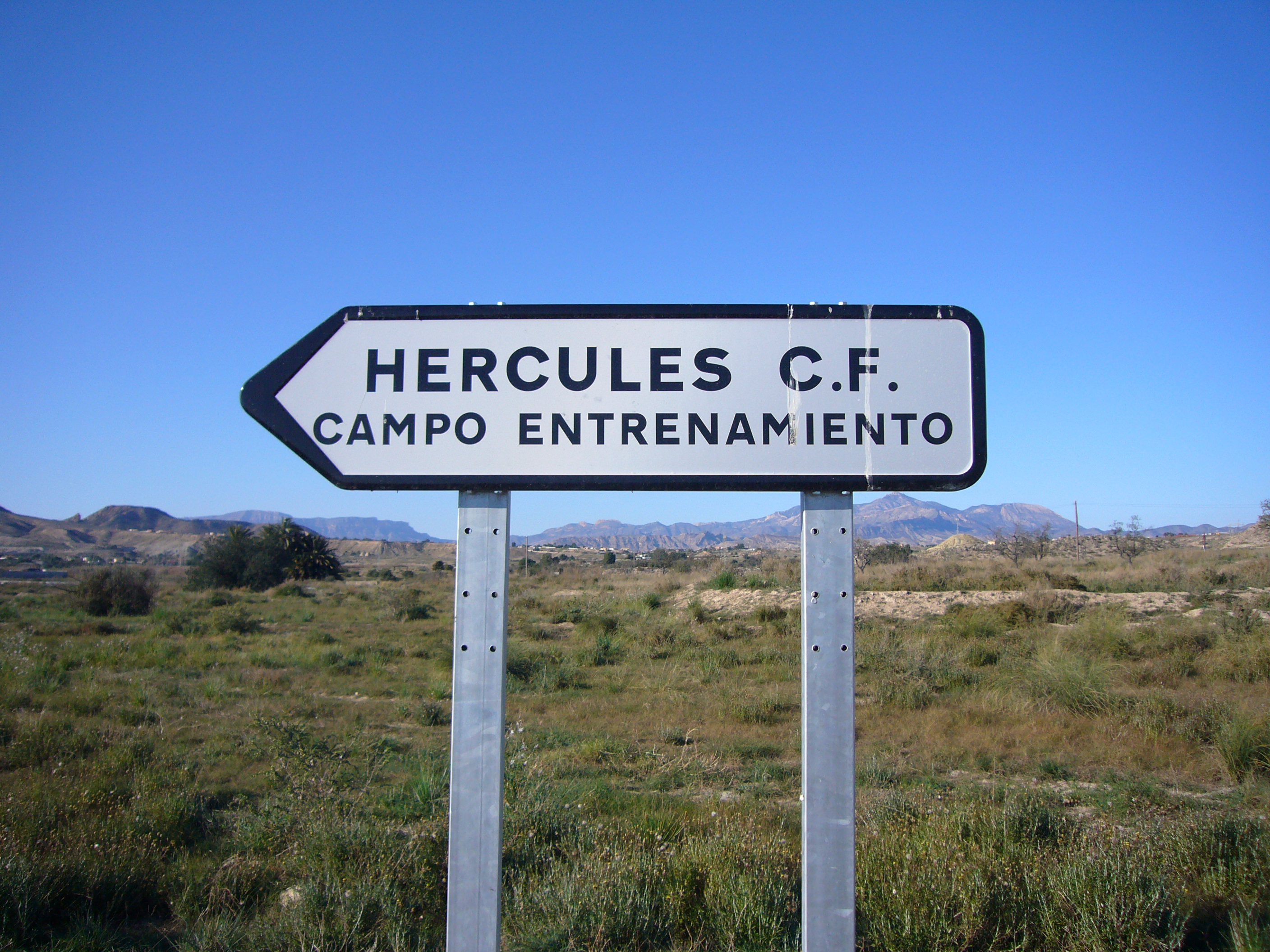 Cartel que indica la dirección del camino para llegar al Campo de Entrenamiento de Fontcalent, del Hércules Club de Fútbol.